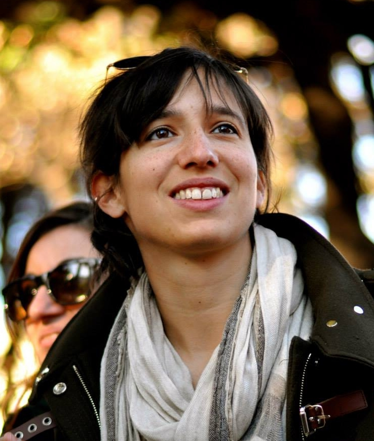 Elly Schlein alla Manifestazione contro il Jobs Act del 25.10.2014 a Roma